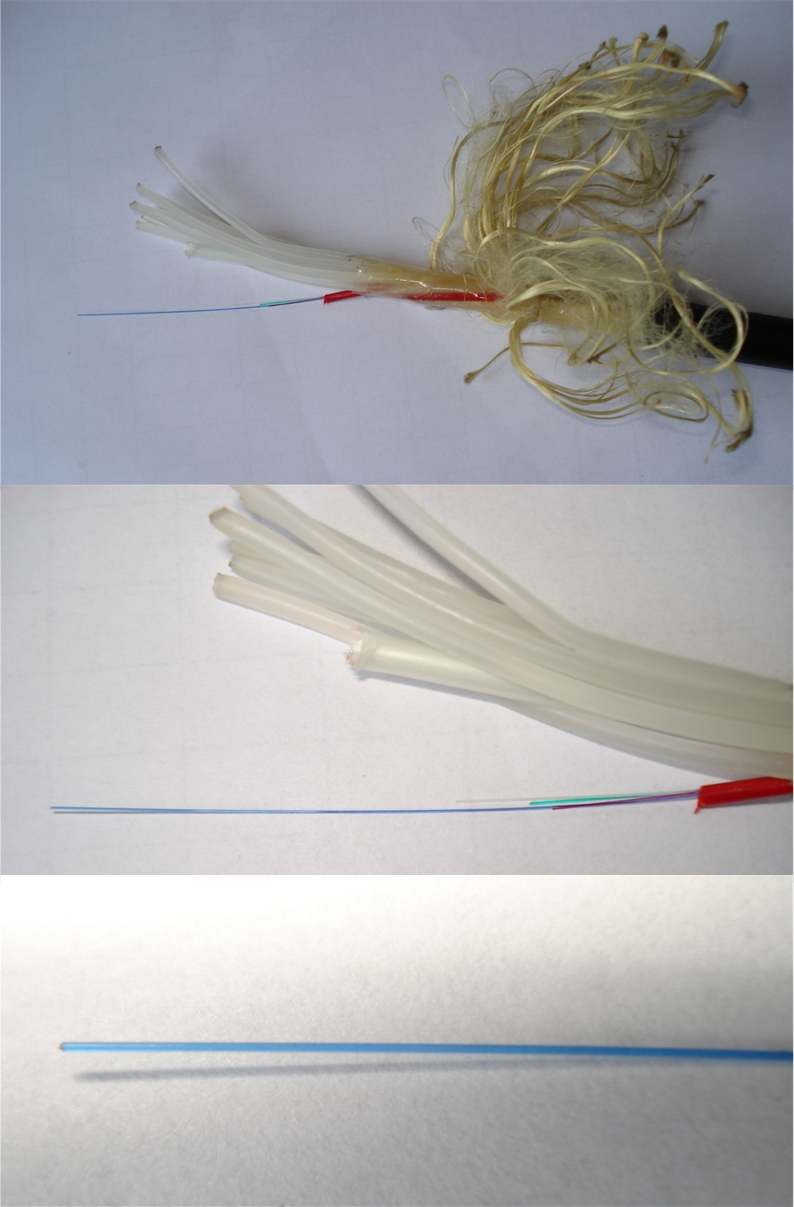 Zdjęcie przedstawia światłowód w różnym stopniu szczegółowości. Autor: Michał Klimek. Data: 08.02.2007.